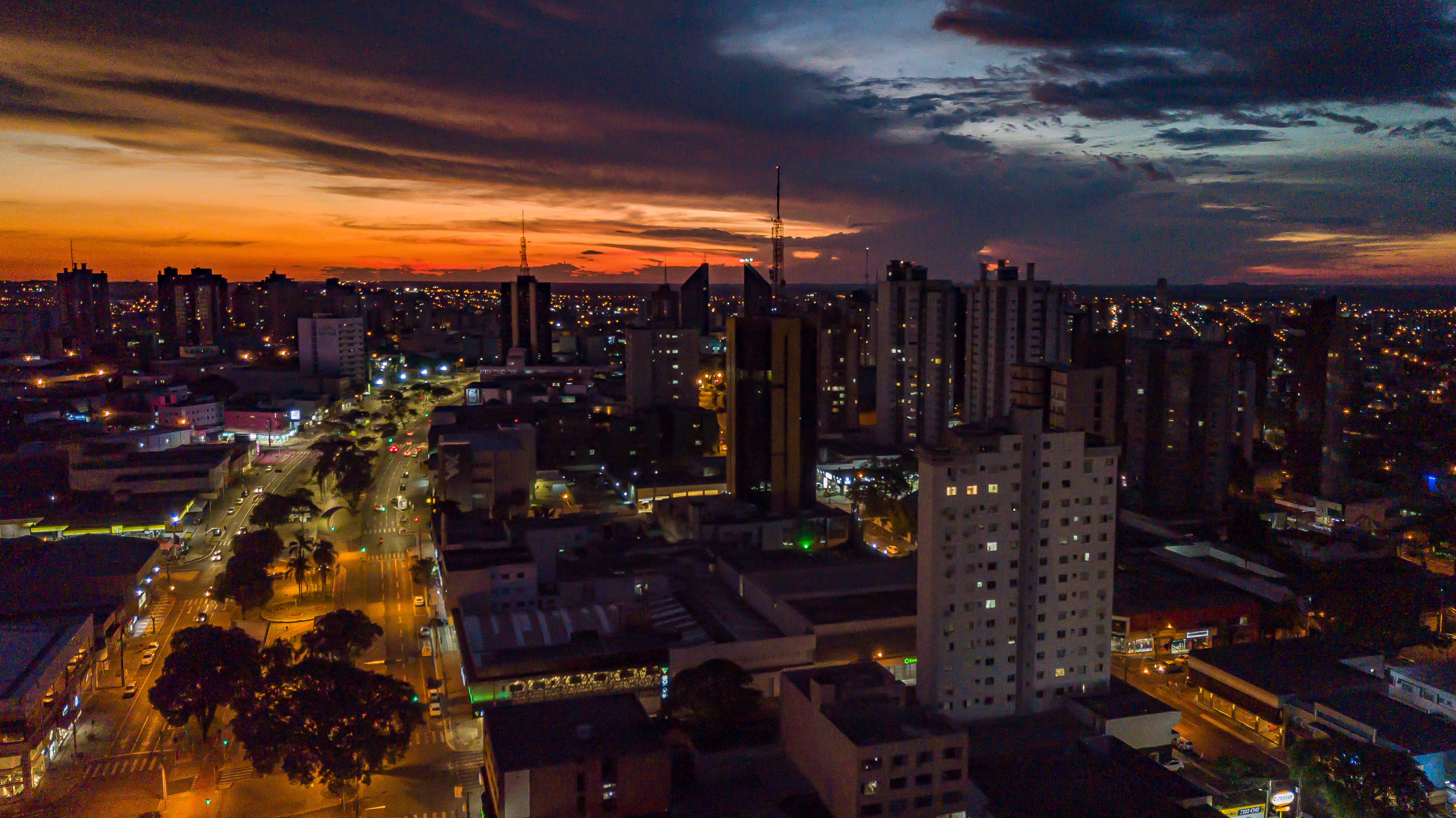 Fotos do Centro de Cascavel-PR a noite fotos com Drone por Fabio Covaleski